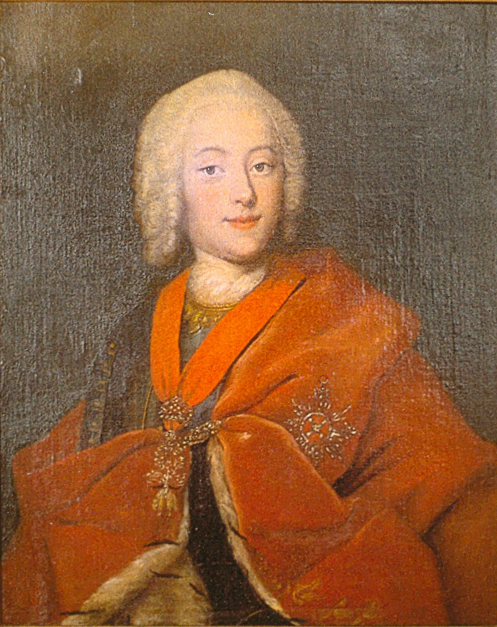 Duke Carl Eugen of Württemberg (1728-1793)